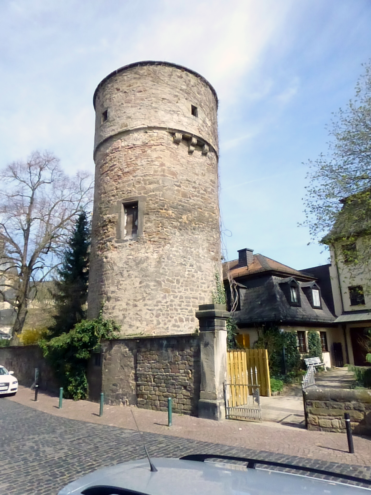 Hexenturm (Fulda) - Gedenktafel